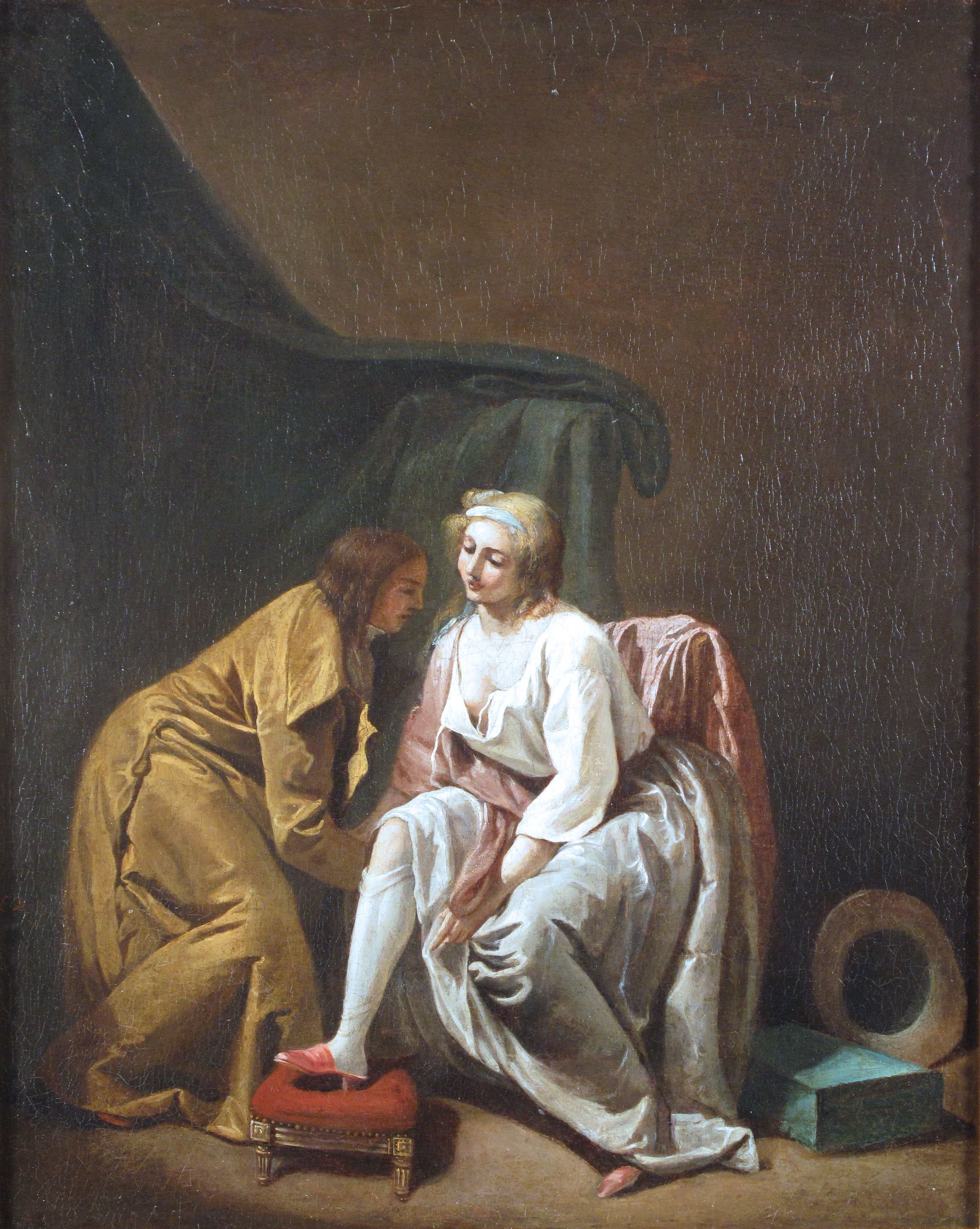 Scena Galante. Firmato L. Boilly (1791) in colore rosso su fondo scuro, circa nel punto medio del lato sinistro